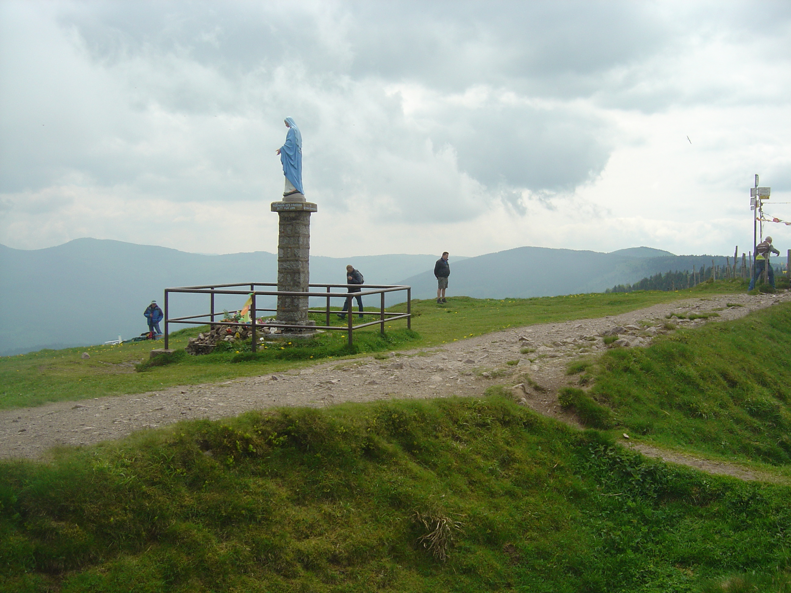 Vierge au sommet du Petit Ballon (1267 ou 1272m selon les sources)